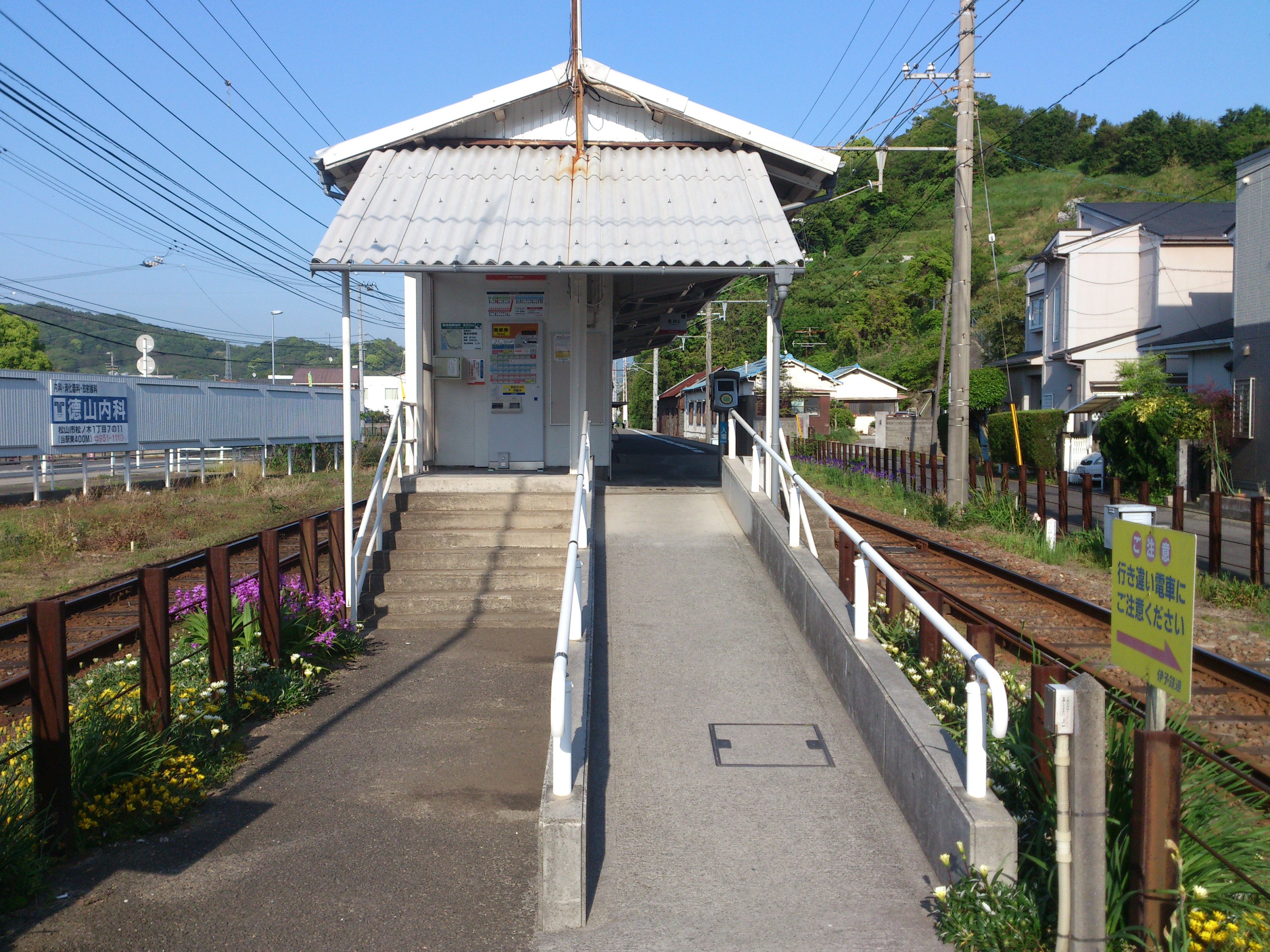 伊予鉄道 港山駅です